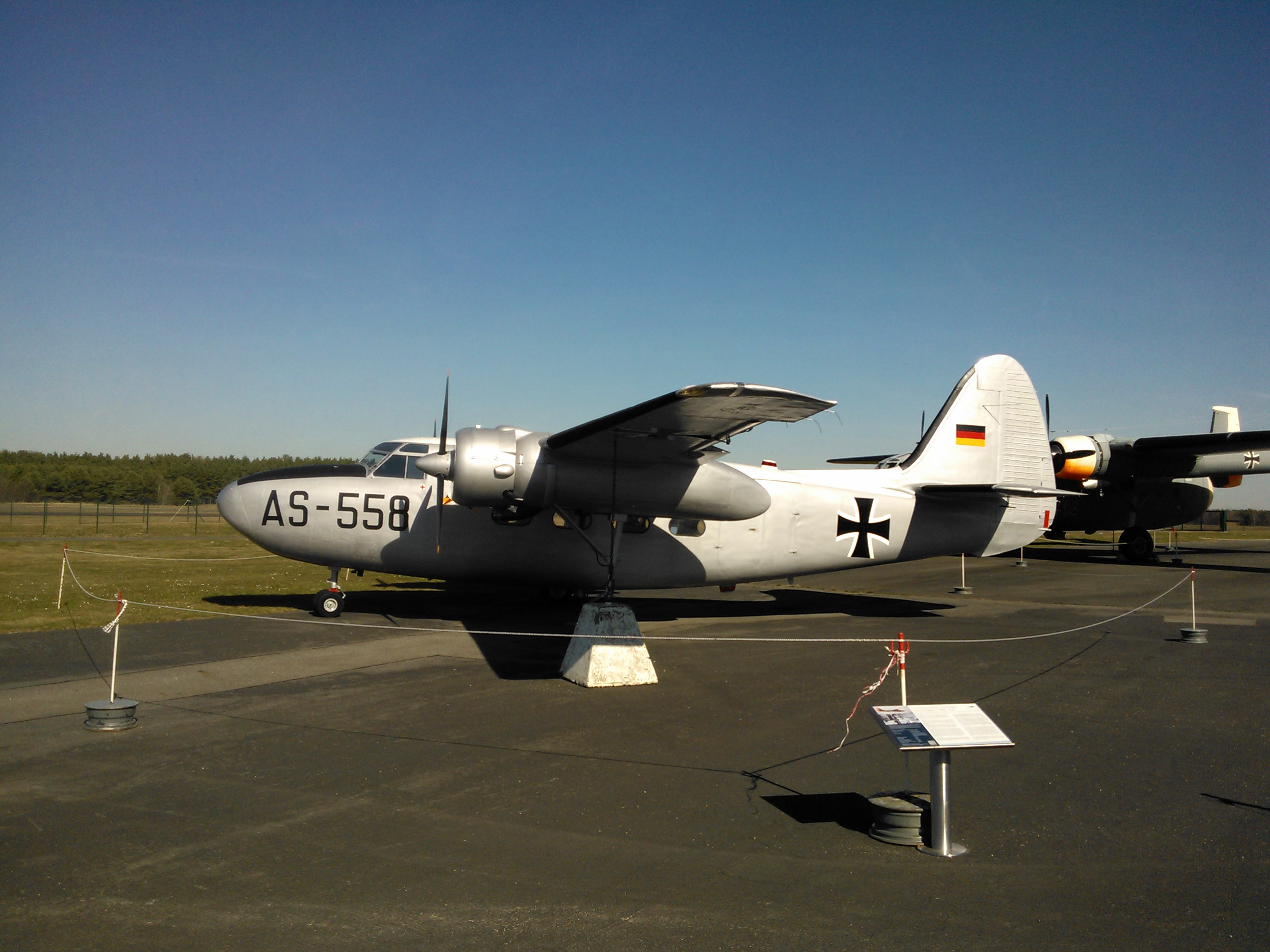 In Berlin Gatow zuletzt 54+07